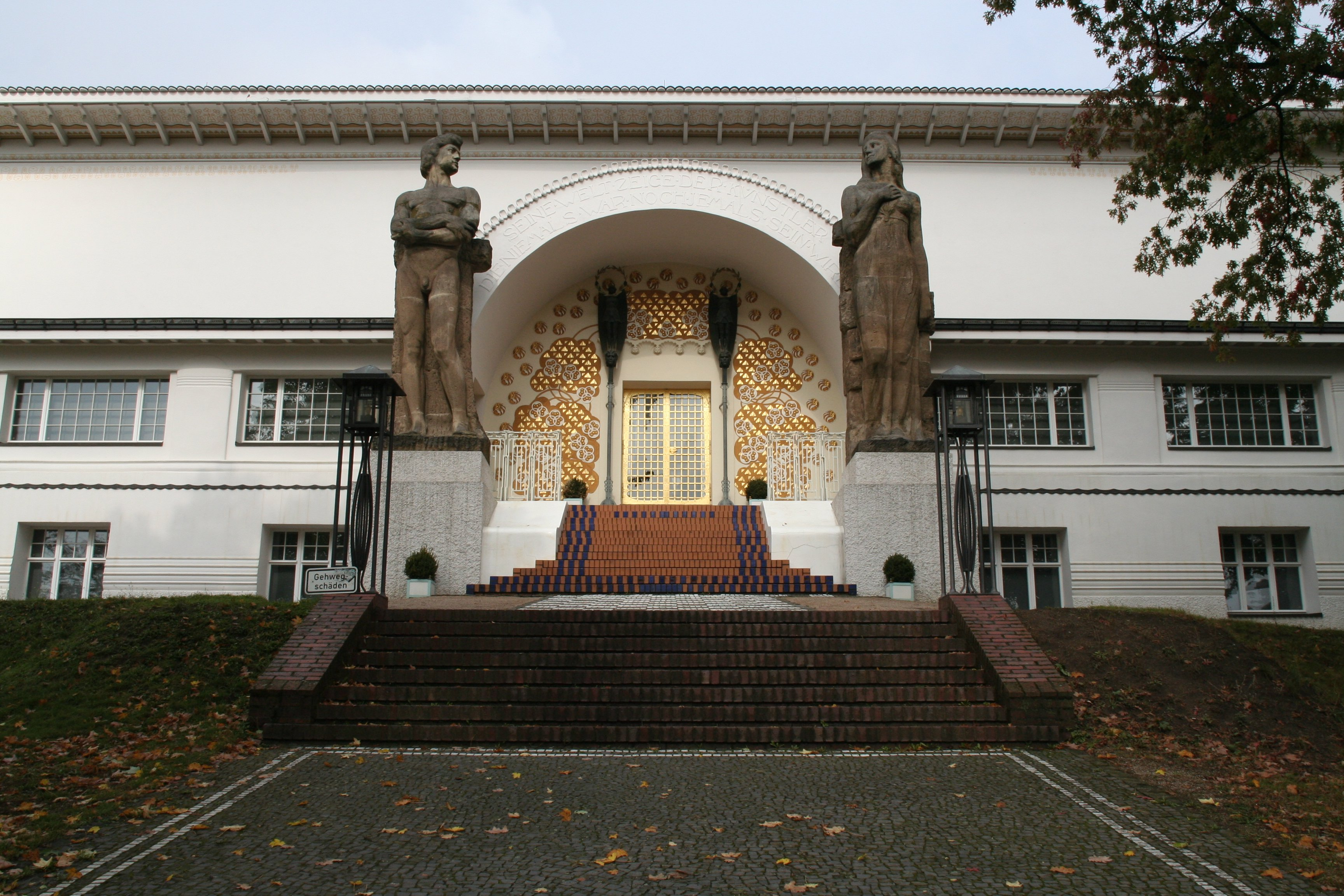 Ernst Ludwig Haus auf der Mathildenhöhe, Darmstadt (Germany)